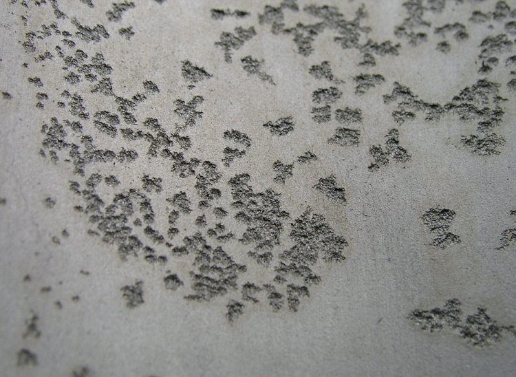 Corrosion par piqûre d'un alliage d'aluminium de la famille des 7000 après décapage